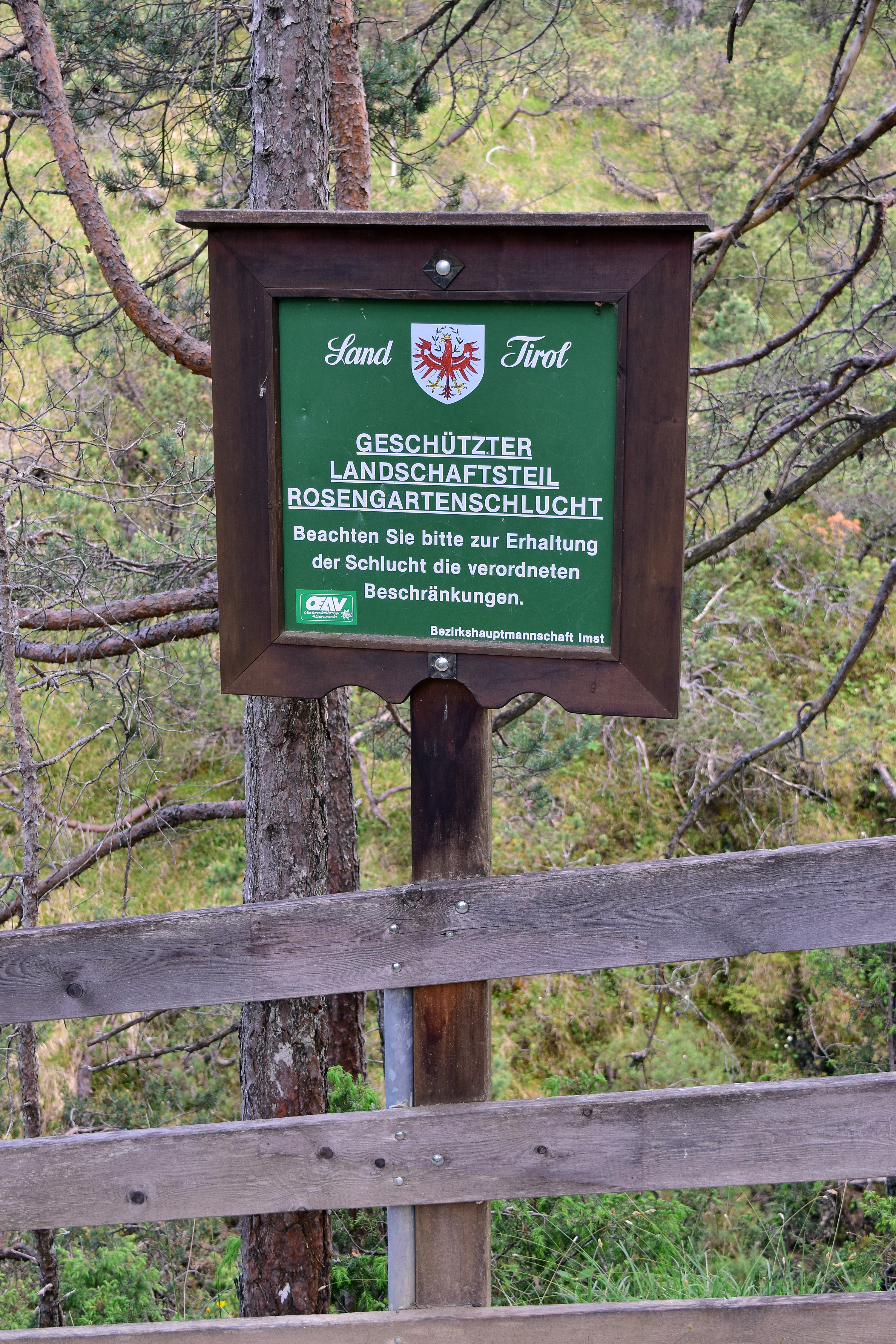 Die vom Schinderbach gegrabene Rosengartenschlucht ist ein geschützter Landschaftsteil in Imst. This media shows the Geschützter Landschaftsteil in the Tyrol with the ID {1 }.